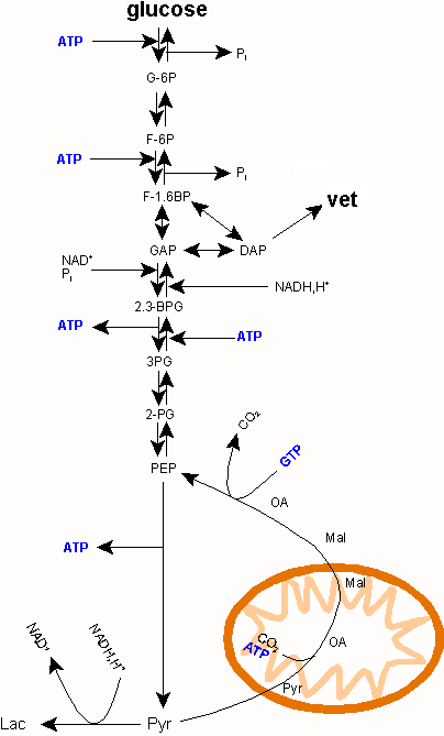 De afbeelding toont een schematische weergave van Gluconeogenese. Ze werd in het Nederlands vertaald door gebruiker:Rasbak.